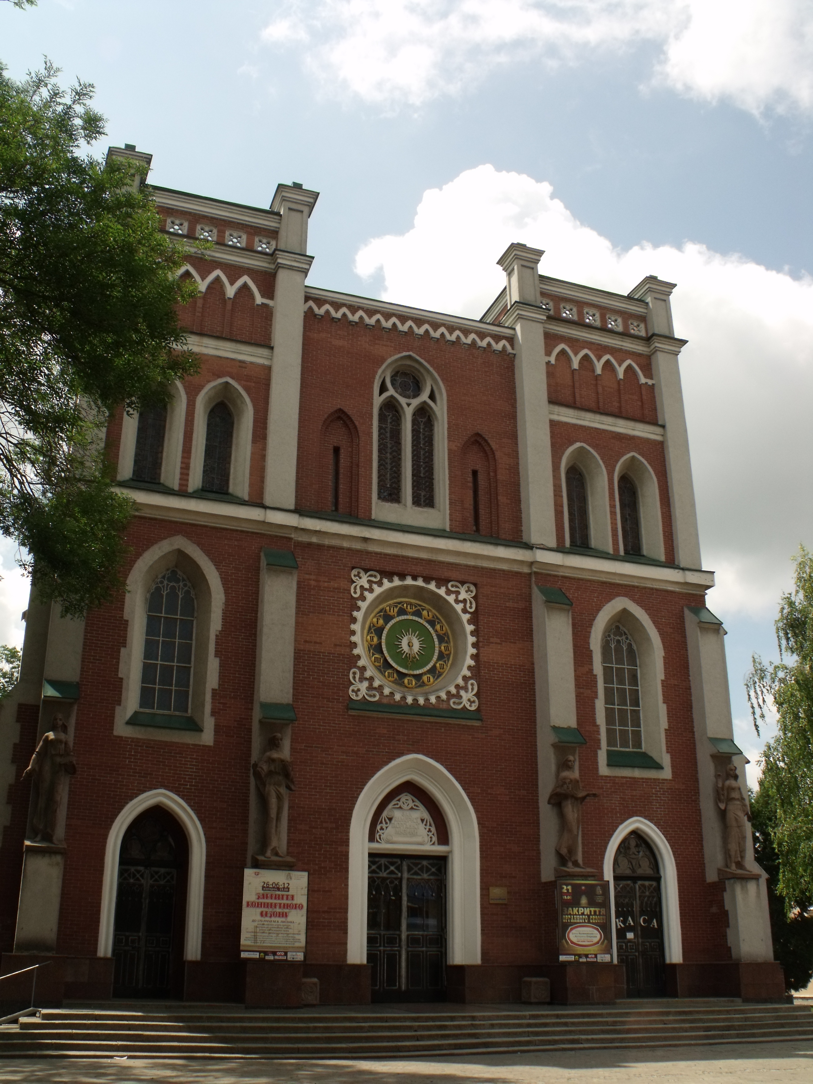 Костел (мур.): Рівне, вул. Соборна, 137